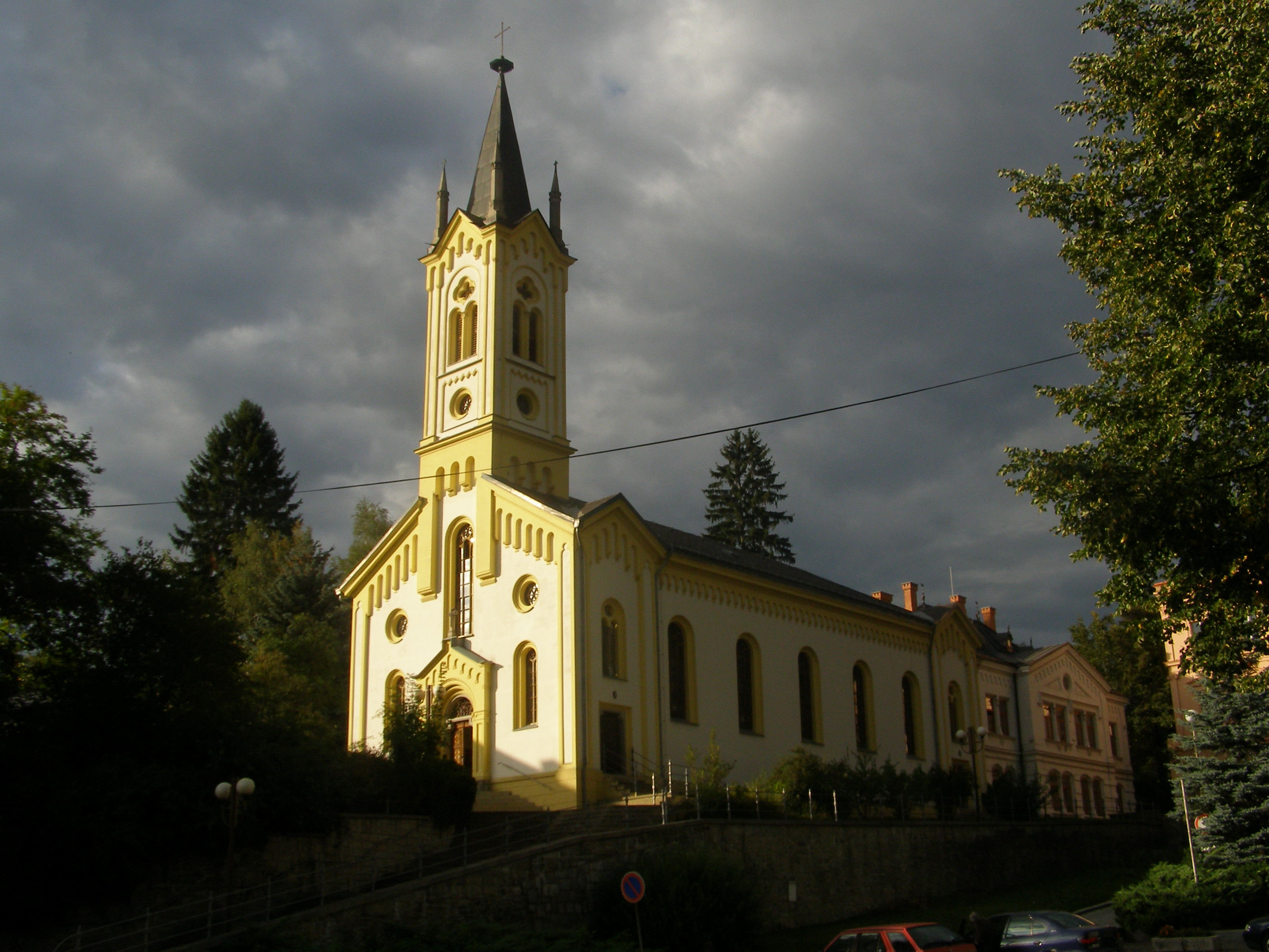 Kostel evangelický (Vsetín)